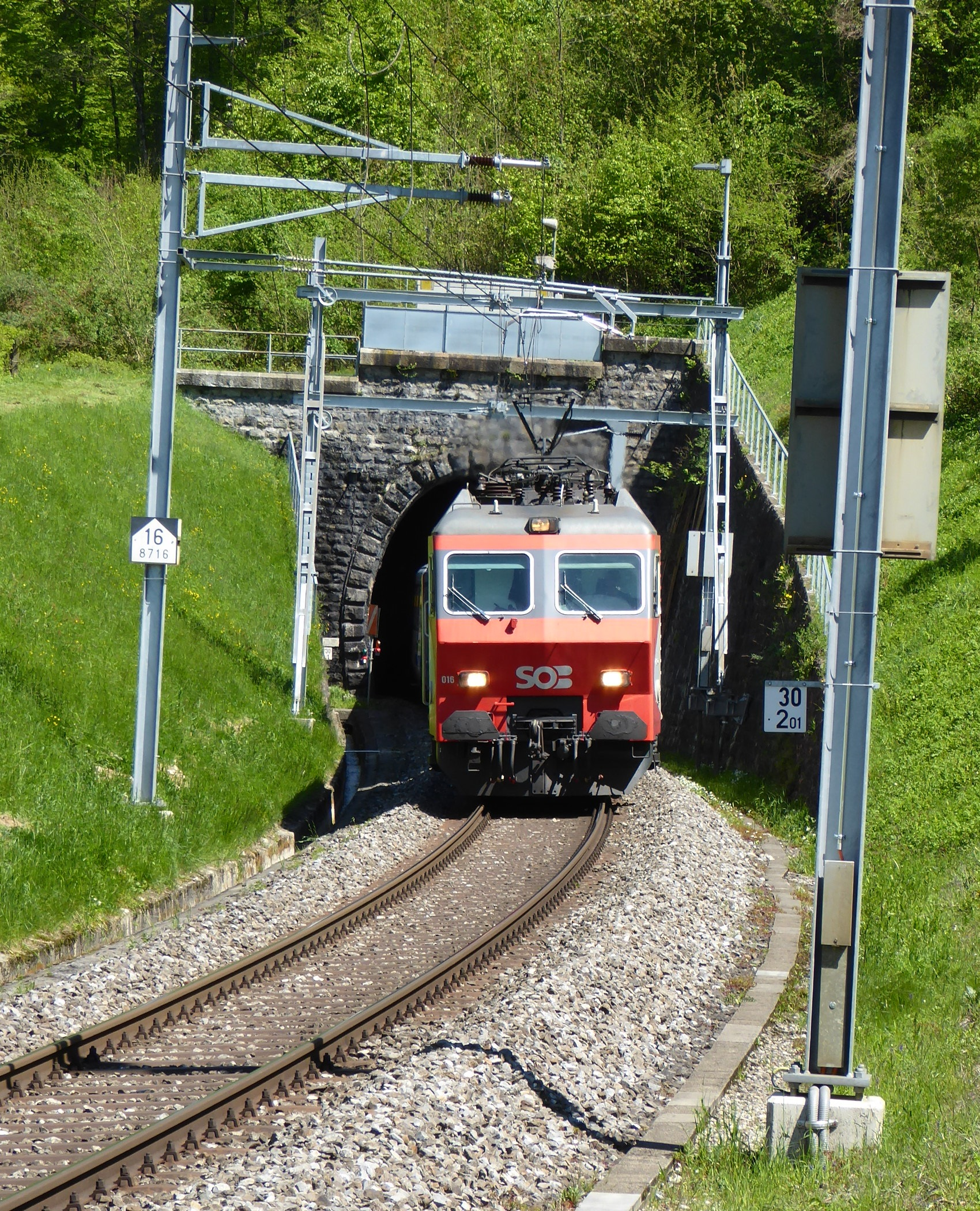 SOB Re 446 mit einem Voralpenexpress bei der Fahrt aus dem Rickentunnel bei Kaltbrunn